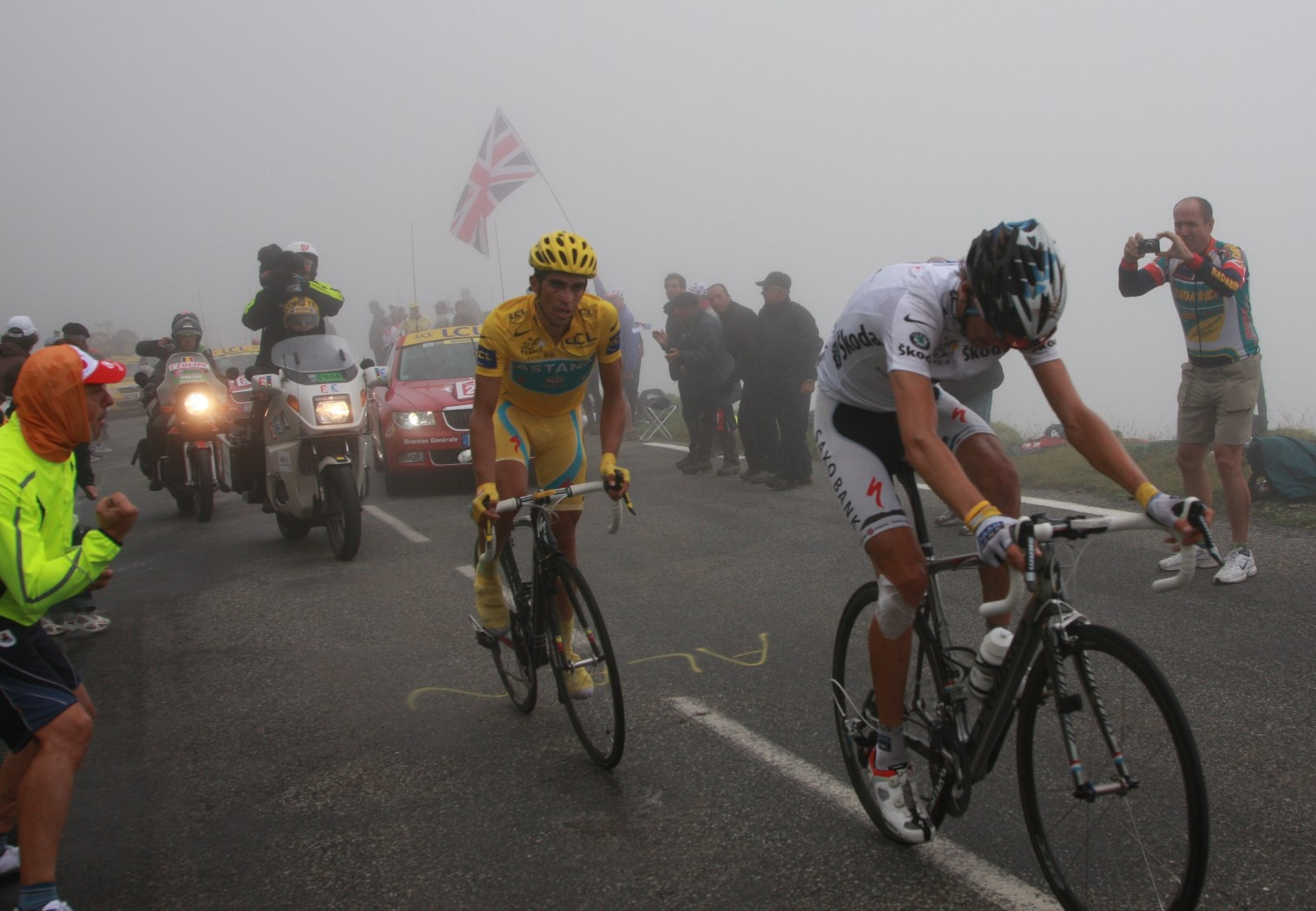 6059 andy en alberto op de tourmalet